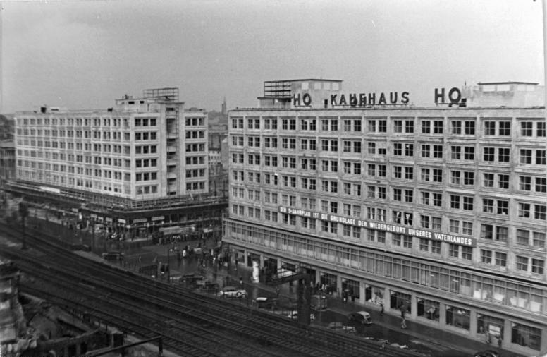 Berlin, Alexanderplatz, HO-Kaufhaus Zwei Jahre Handelsorganisation HO. Am 15. November 1950 begeht die Handelsorganisation HO der Deutschen Demokratischen Republik ihr zweijähriges Bestehen. Illus Funck 18.10.50 Berlin 1950 - Blick auf den Alexanderplatz. Links das Berolinahaus, rechts das HO-Kaufhaus.